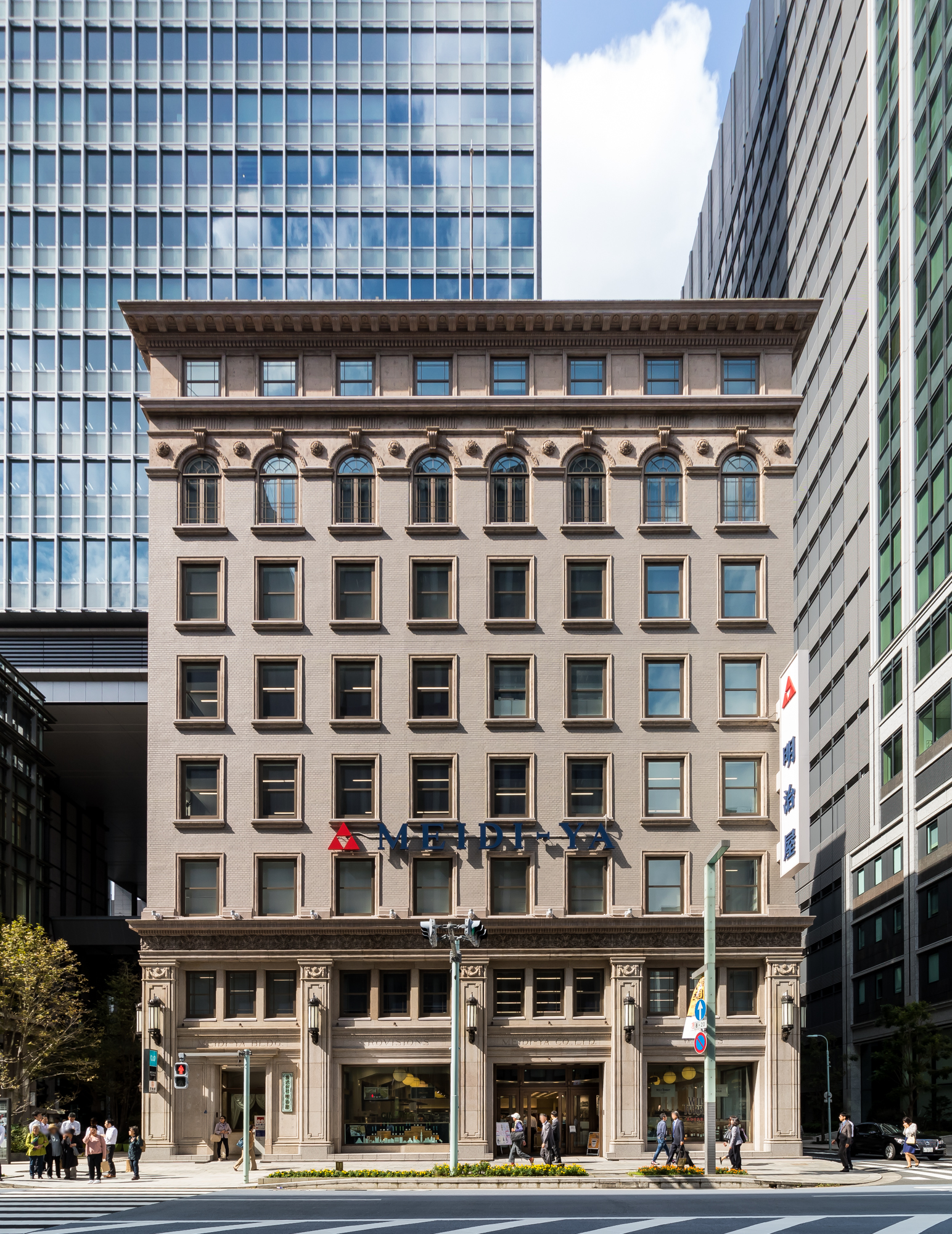 明治屋本社、明治屋京橋ビル（東京都中央区の有形文化財）